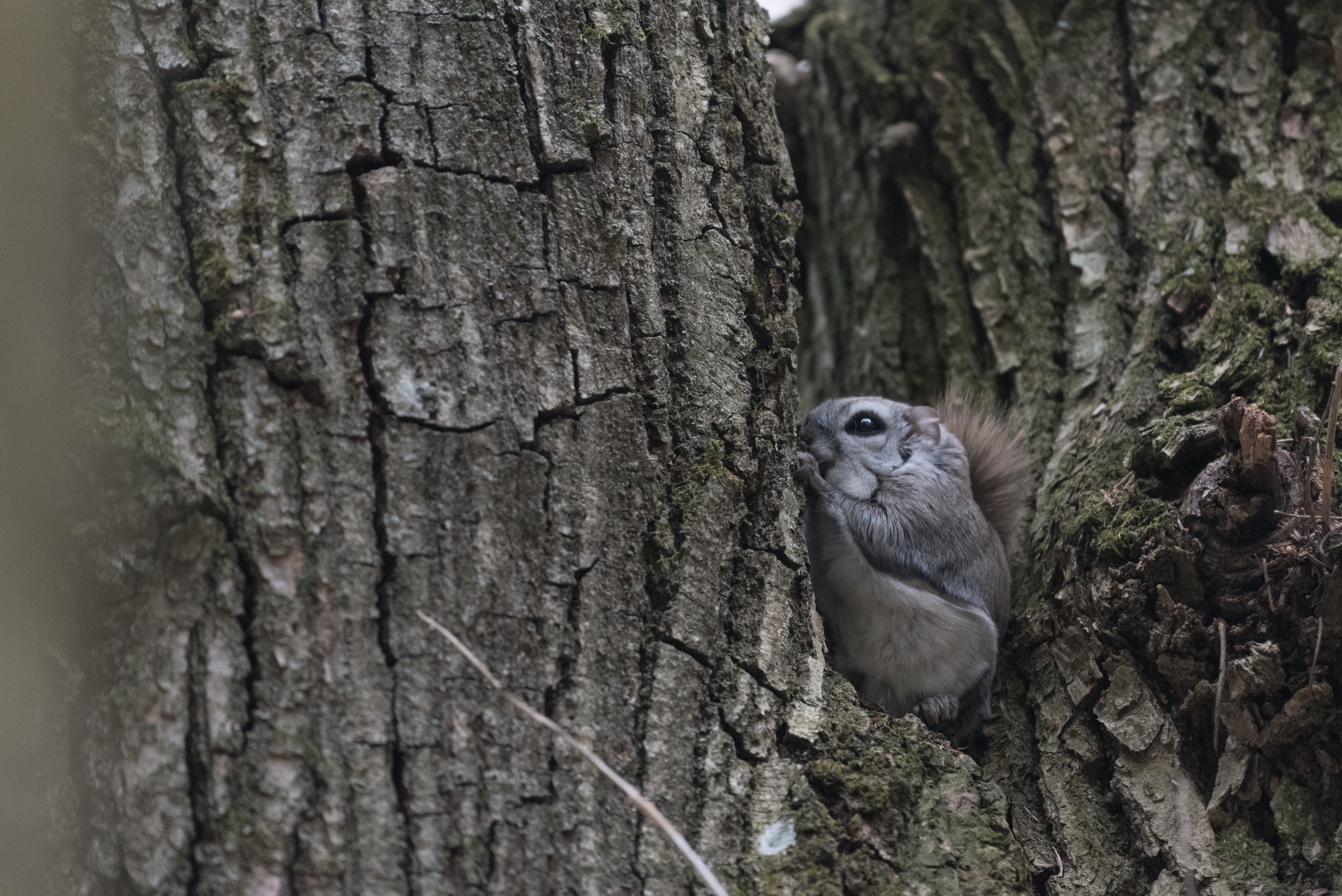 Летяга в смешанном лесу. Калужская область. Бор города Боровск.